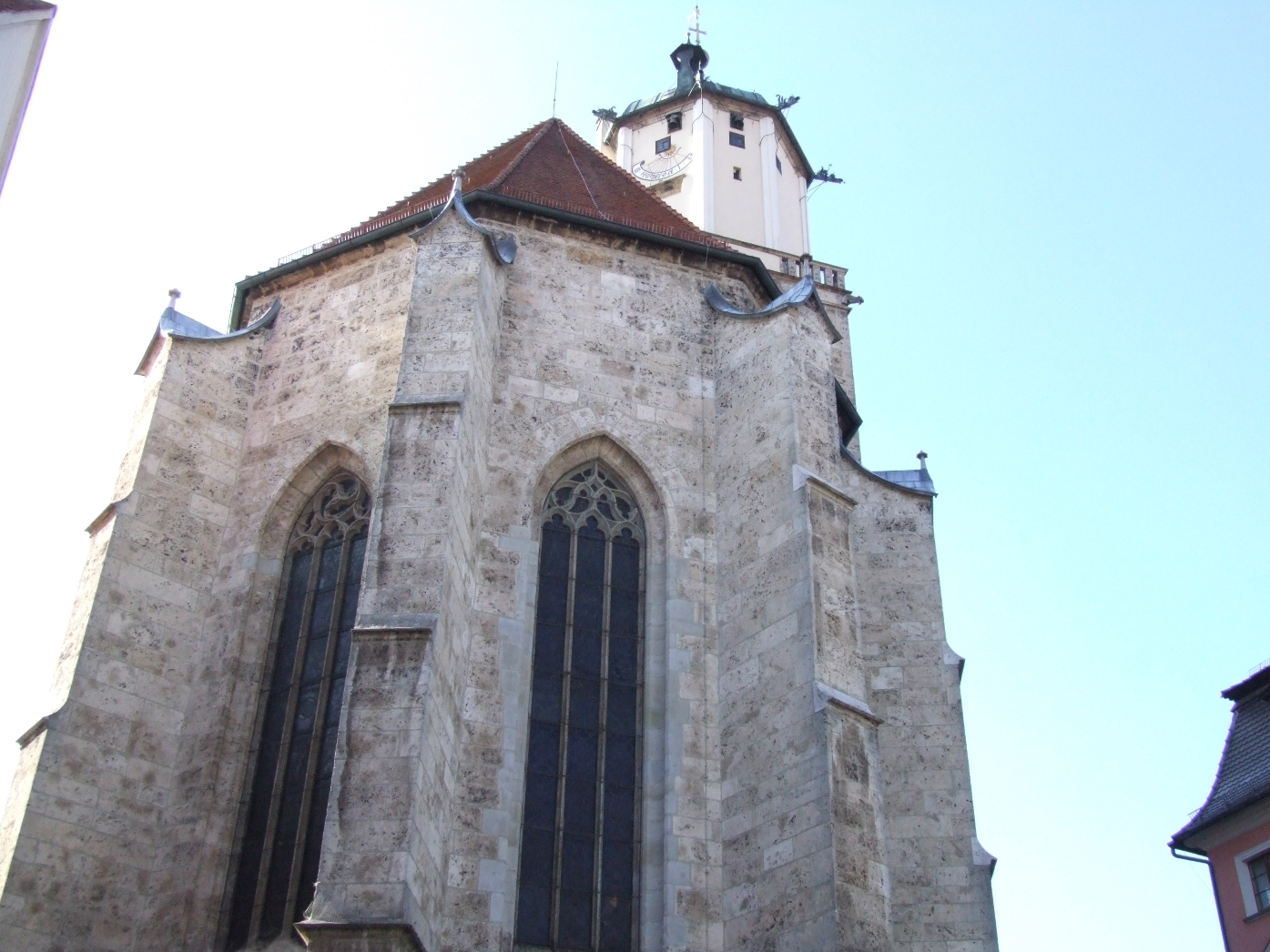 Chor und Turm von St. Martin